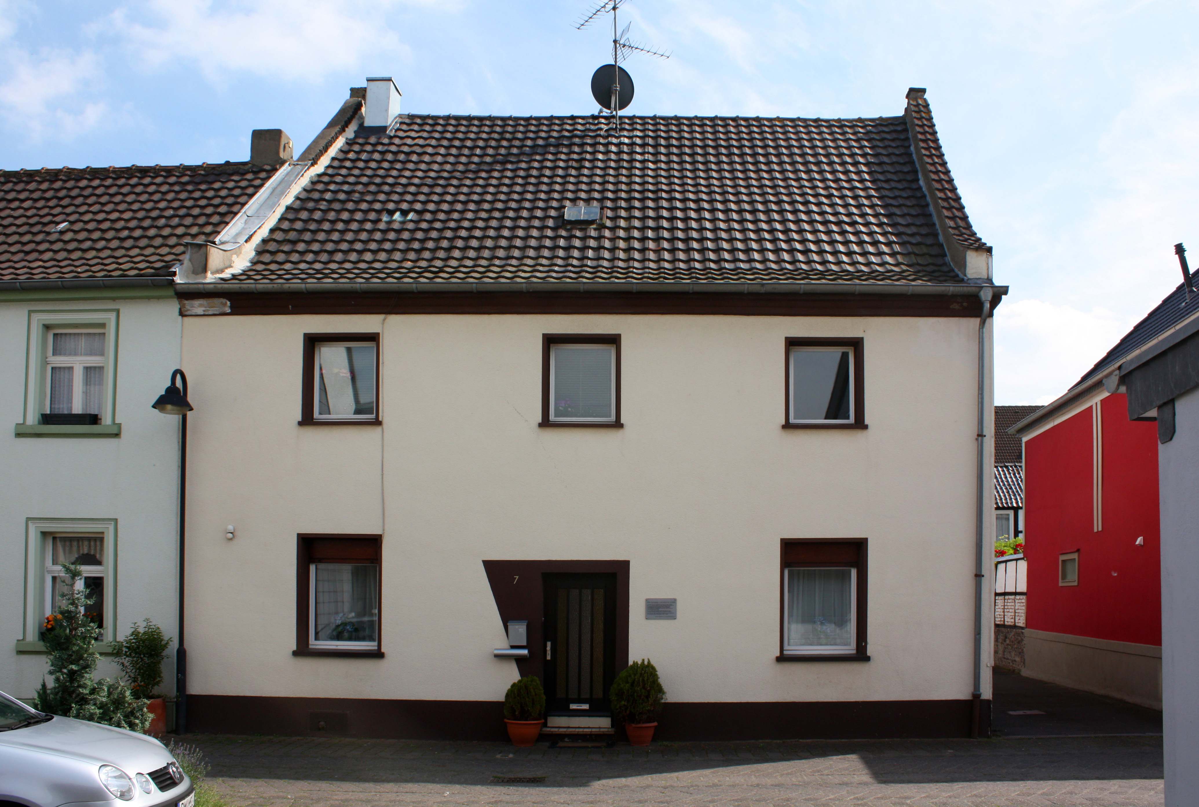 Erftstadt Lechenich, Judenstraße 7